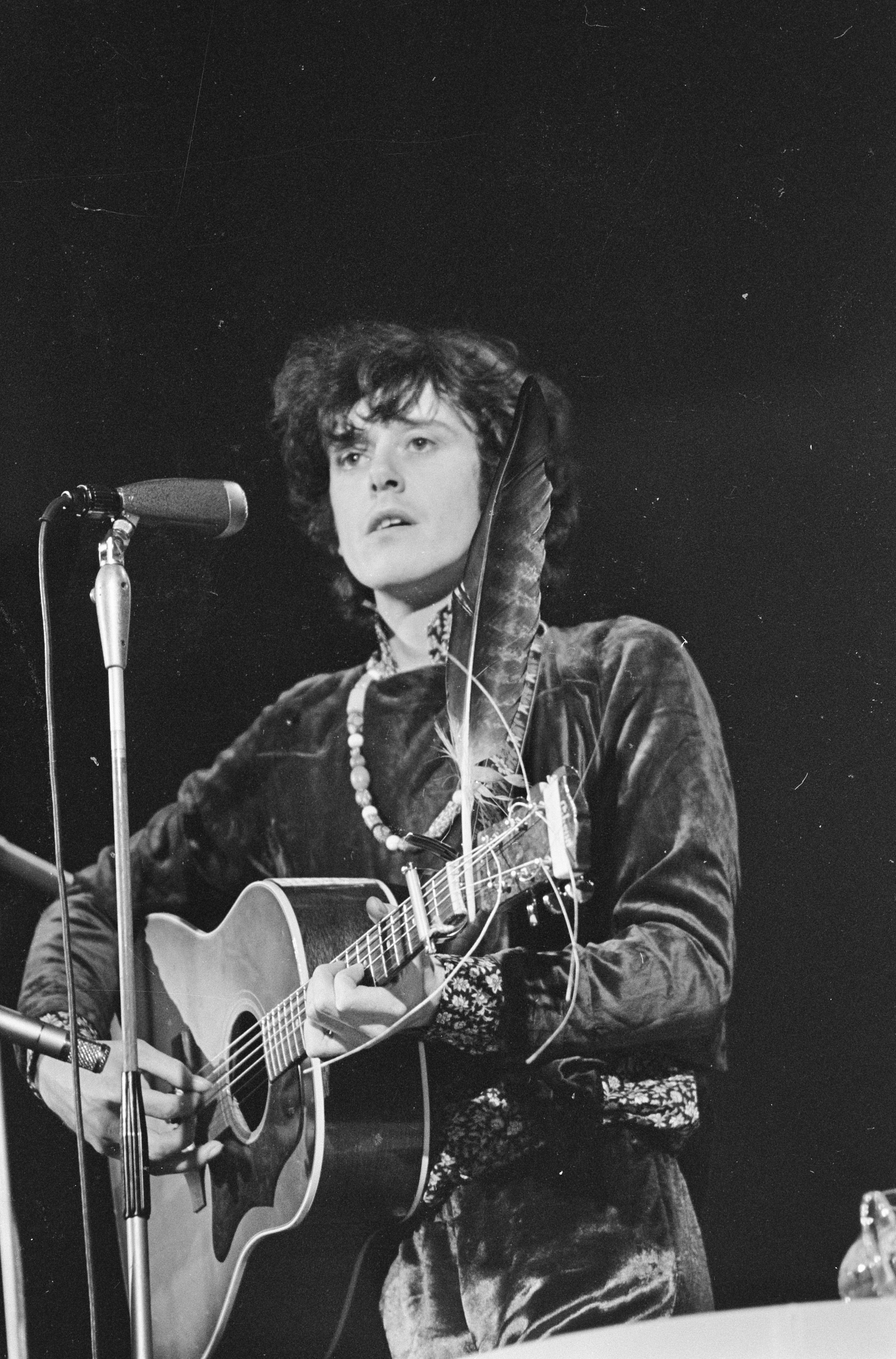 Collectie / Archief : Fotocollectie Anefo Reportage / Serie : [ onbekend ] Beschrijving : Bal Boetiek in Concertgebouw. Zanger Donovan tijdens optreden Datum : 9 september 1967 Locatie : Amsterdam Trefwoorden : evenementen, festivals, zangers Persoonsnaam : Donovan Fotograaf : Kroon, Ron / Anefo Auteursrechthebbende : Nationaal Archief Materiaalsoort : Negatief (zwart/wit) Nummer archiefinventaris : bekijk toegang 2.24.01.05 Bestanddeelnummer : 920-6859